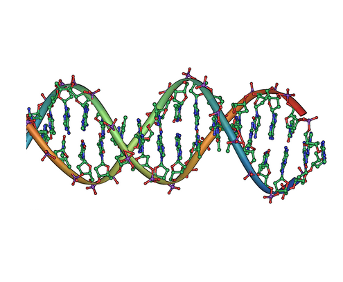 DNA double helix horizontal